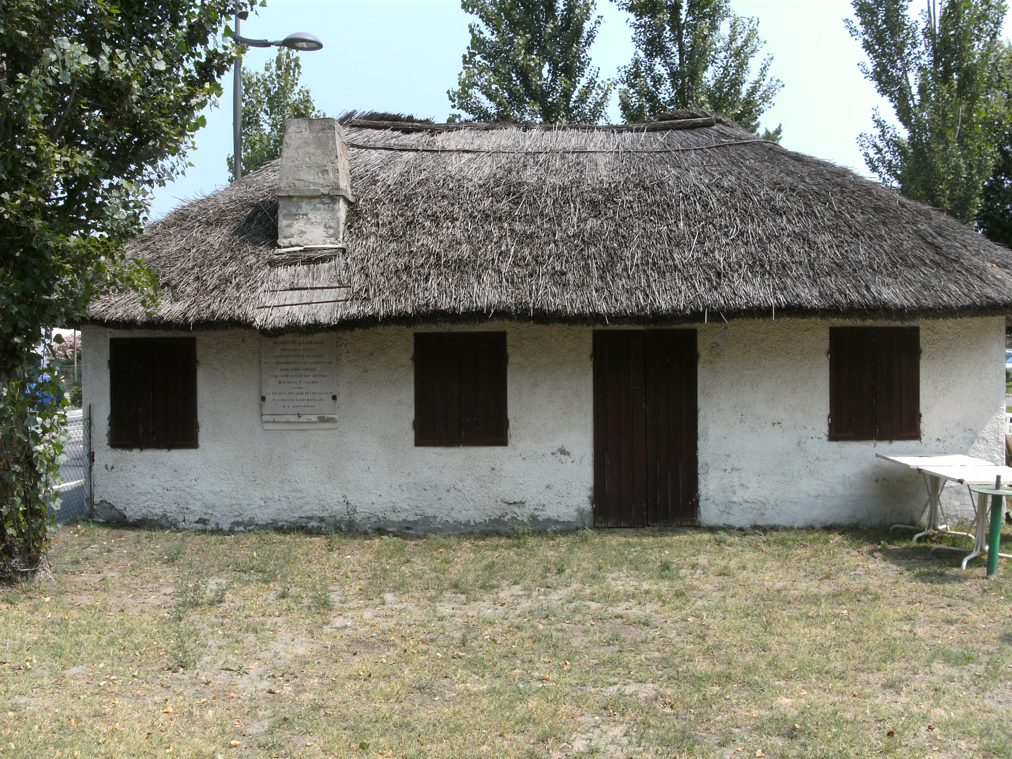 Lido delle Nazioni (Comacchio, Fe), Garibaldi-Hütte, erstes Versteck Garibaldis 1849 (siehe Gedenktafel links an der Außenwand)